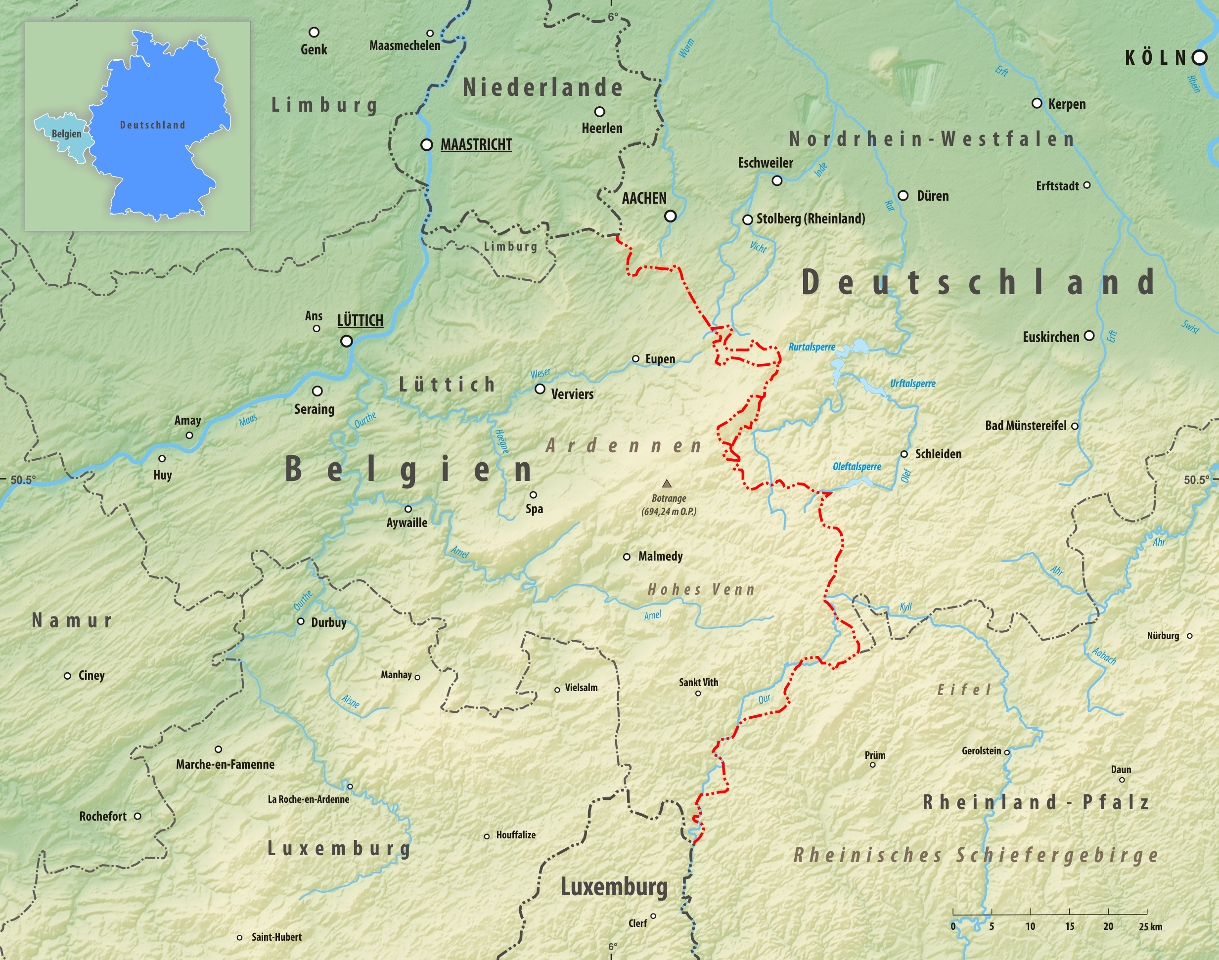 Reliefkarte des Grenzverlaufes zwischen der Deutschland und Belgien Topographischer Hintergrund: NASA Shuttle Radar Topography Mission (public domain). SRTM3 v.2.